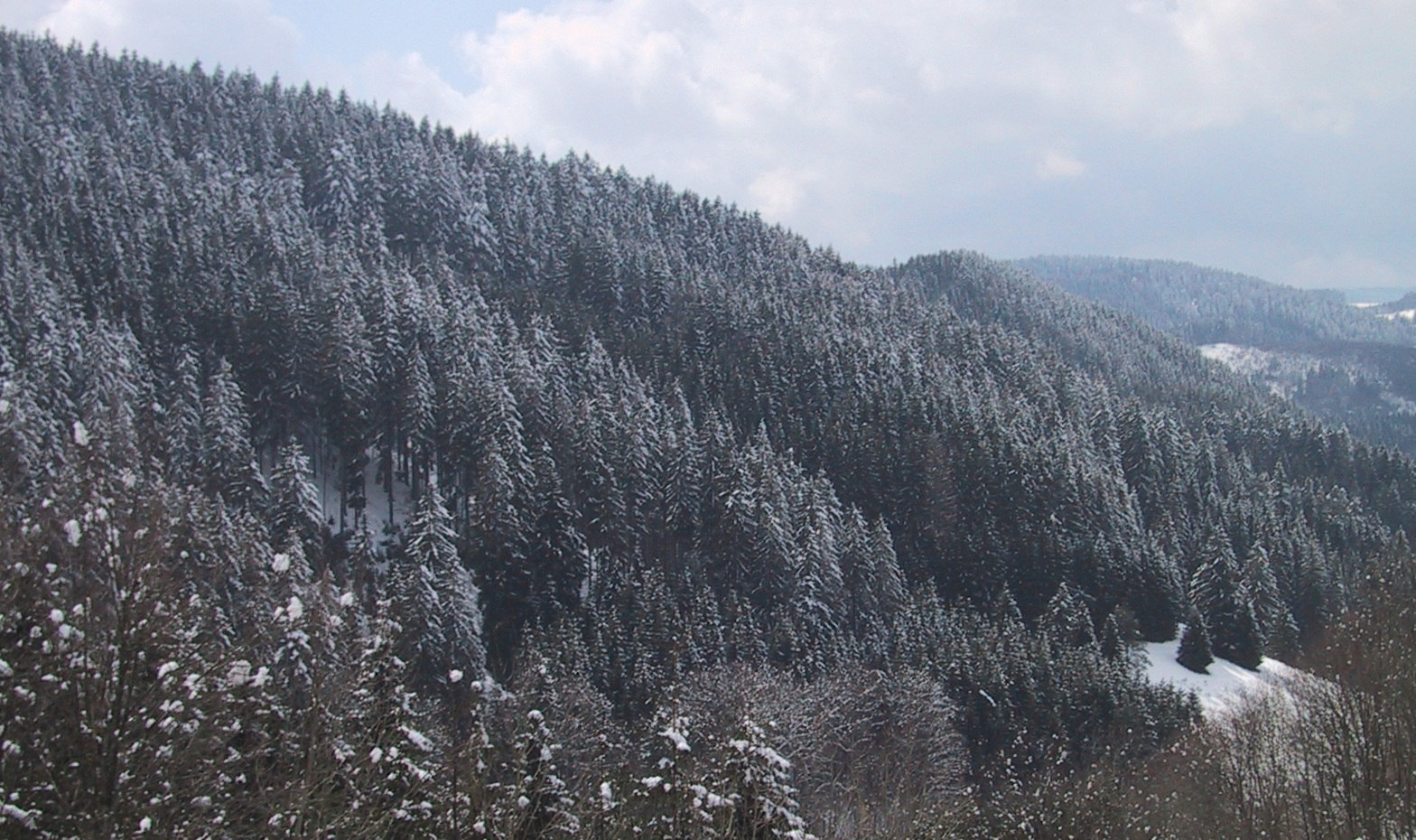 Typischer Fichtenwald im Schwarzwald, Blick bei St. Georgen, Quelle: selbst fotografiert, Fotograf: Siegfried Wessler, Datum: 11. April 2006